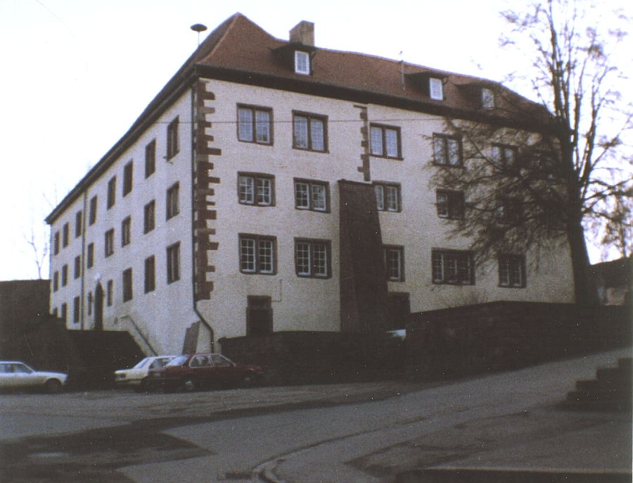 Schloss Walldürn